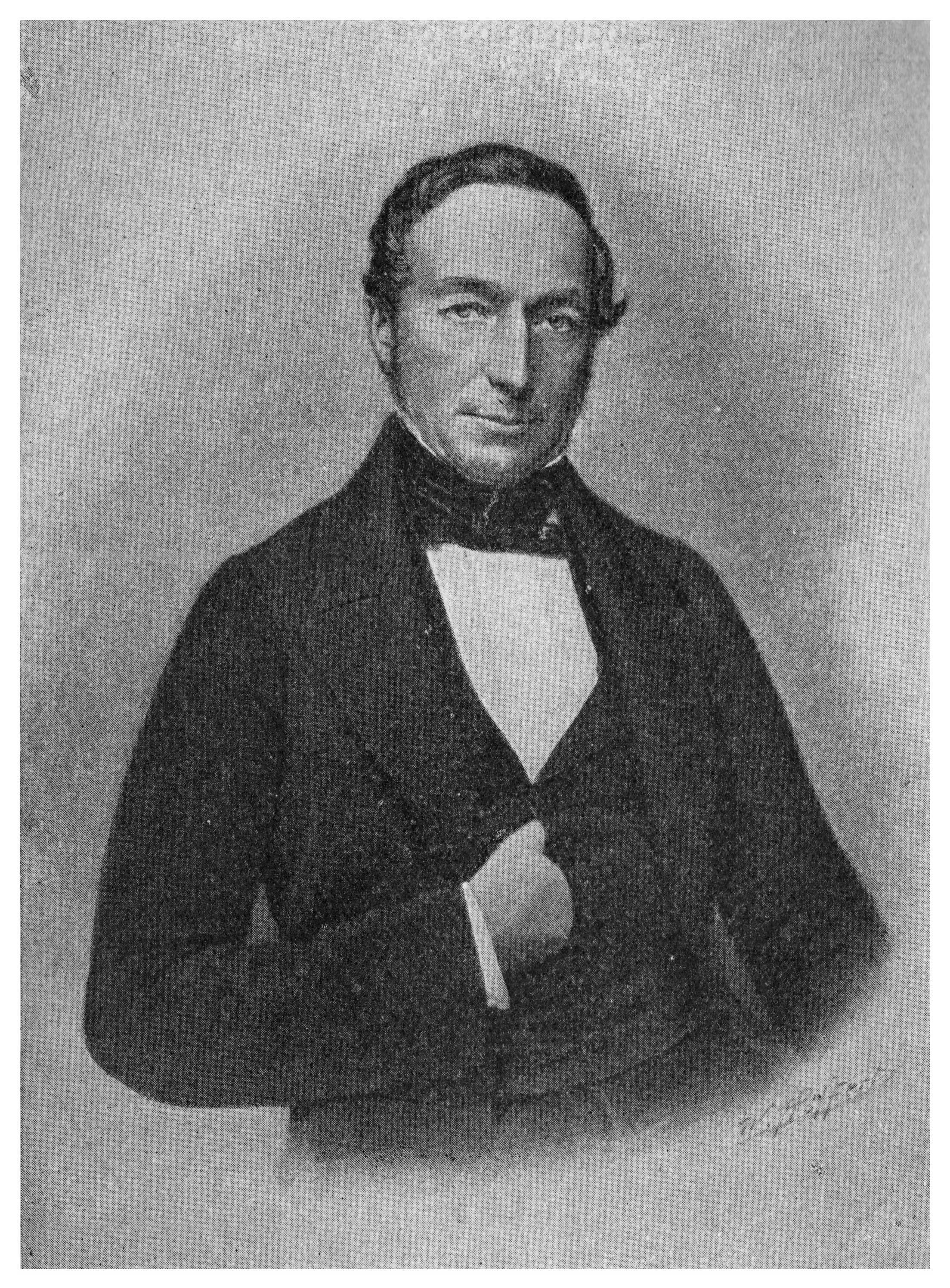 Porträt des Ministers Eduard von Schele zu Schelenburg (1805-1875).